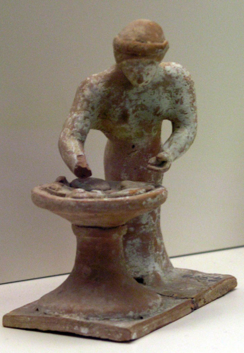 Figurine de femme en train de pétrir de la pâte à pain. Tanagra (4044), Érétrie (4052) et Chalcis (6006), vers 500-475 a. C. Musée archéologique national, Athènes, n°27.